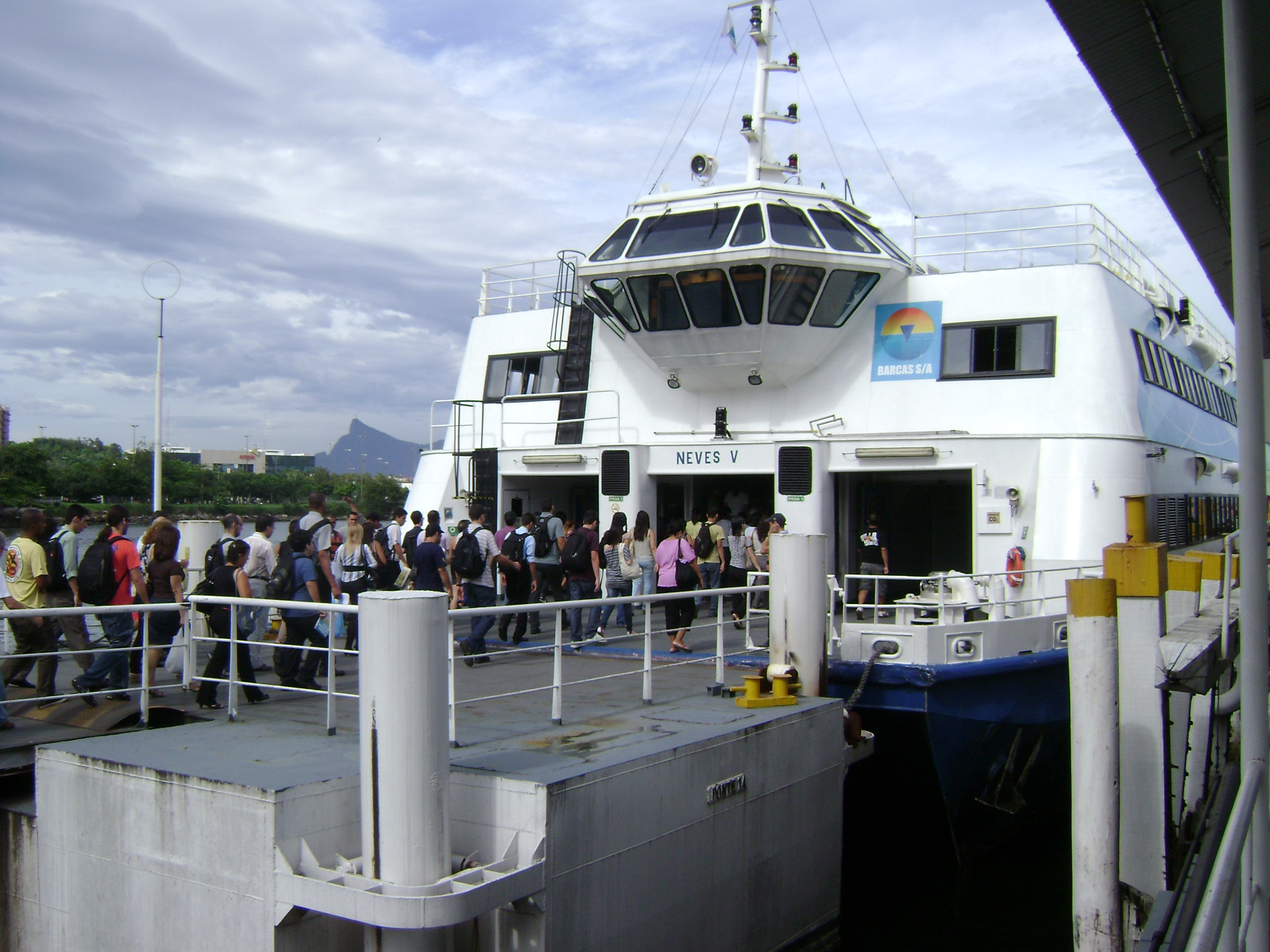 Pessoas entrando em uma barca em Niterói, Rio de Janeiro, Brasil.